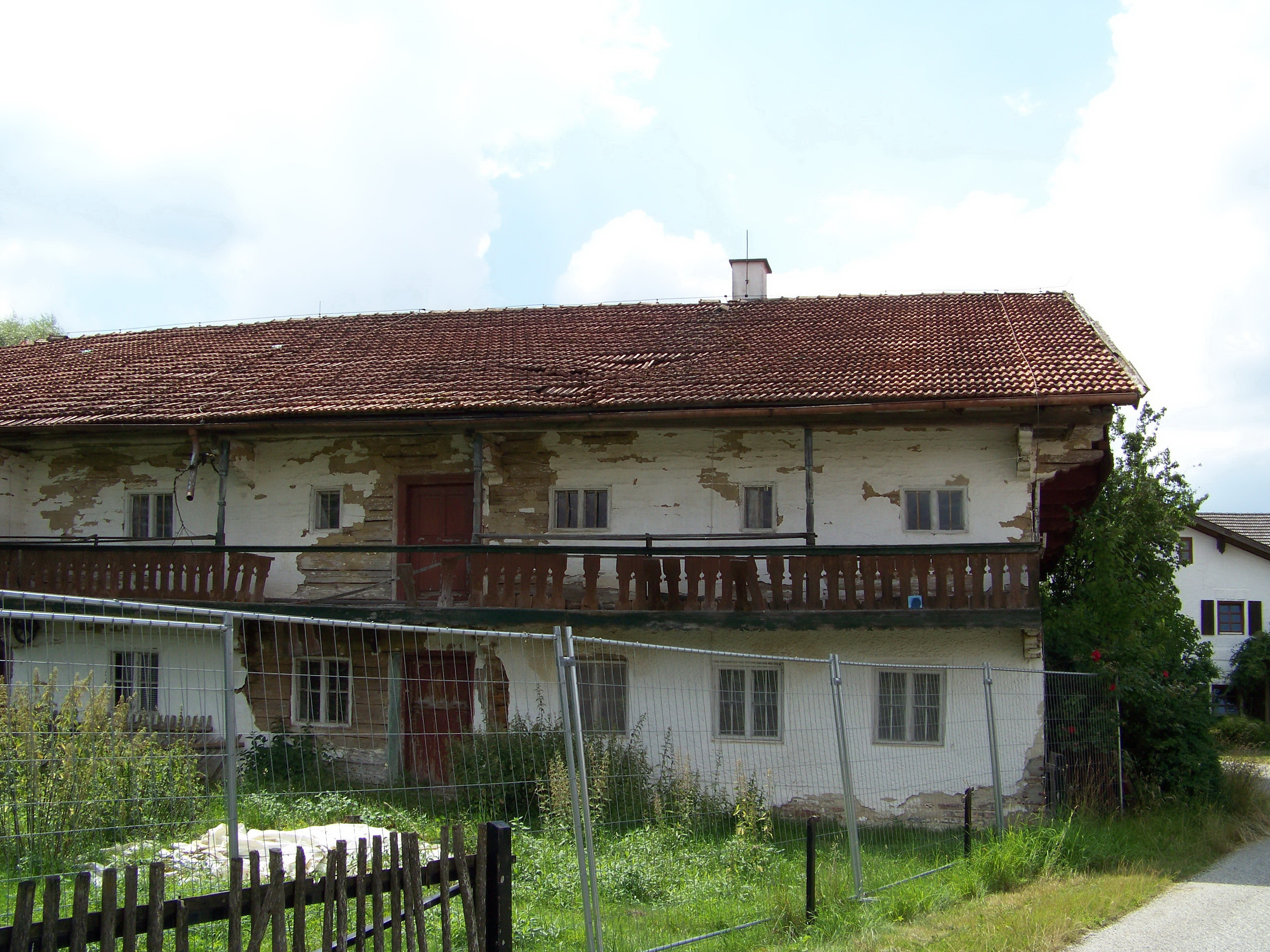 Kröning, Bödldorf 4. Ehemaliges Hafneranwesen. Mittertennbau, zweigeschossiger Flachsatteldachbau mit verputztem Blockbau-Obergeschoss und alten Fenstern, Trauf- und Oberbodenschrot, zweiten Hälfte 18. Jahrhundert.